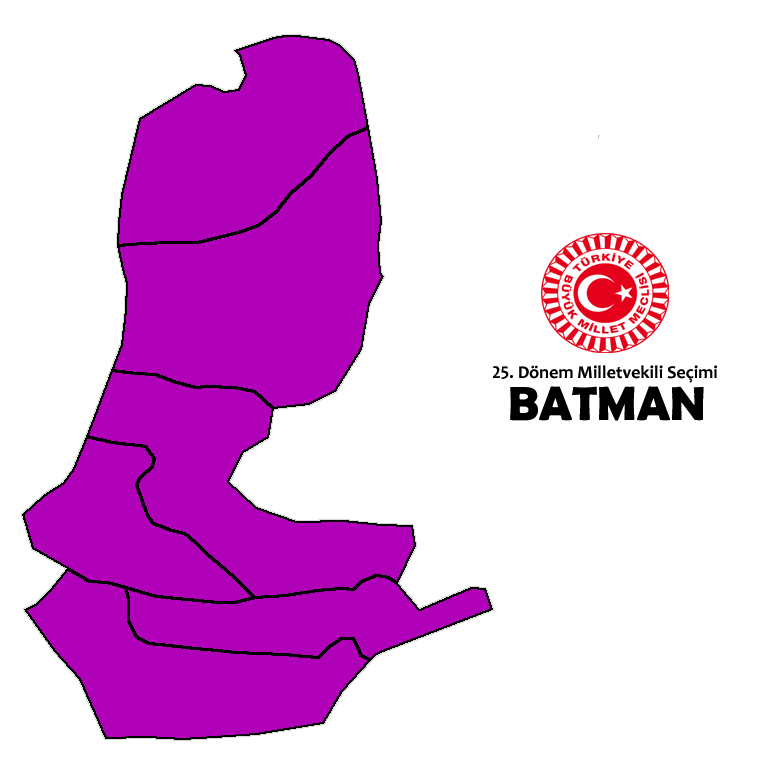 2015 genel seçim sonuçları